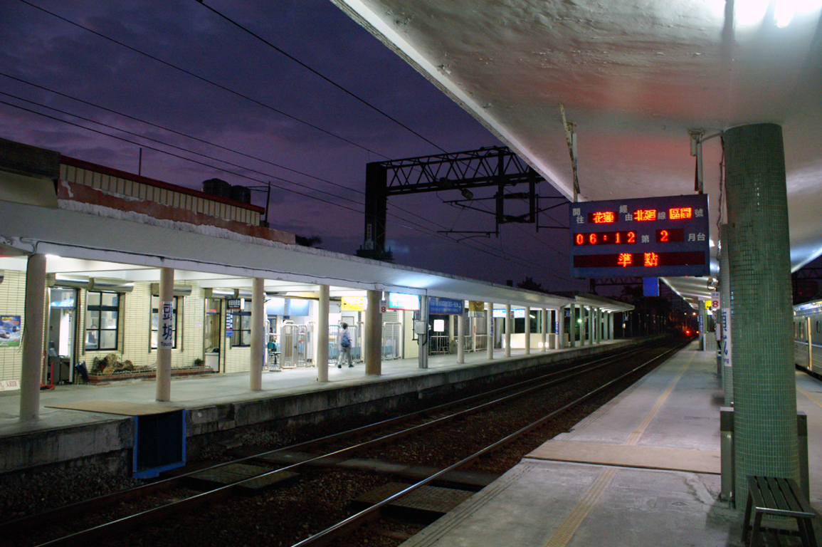 清晨六點的臺灣鐵路管理局頭城車站月台。